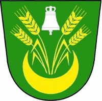 Bezděčí u Trnávky, znak. V zeleném štítě dvě dvojice odkloněných obilných klasů, každý s listem, nad stoupajícím půlměsícem, obojí zlaté. Mezi klasy stříbrný zvon se závěsem.